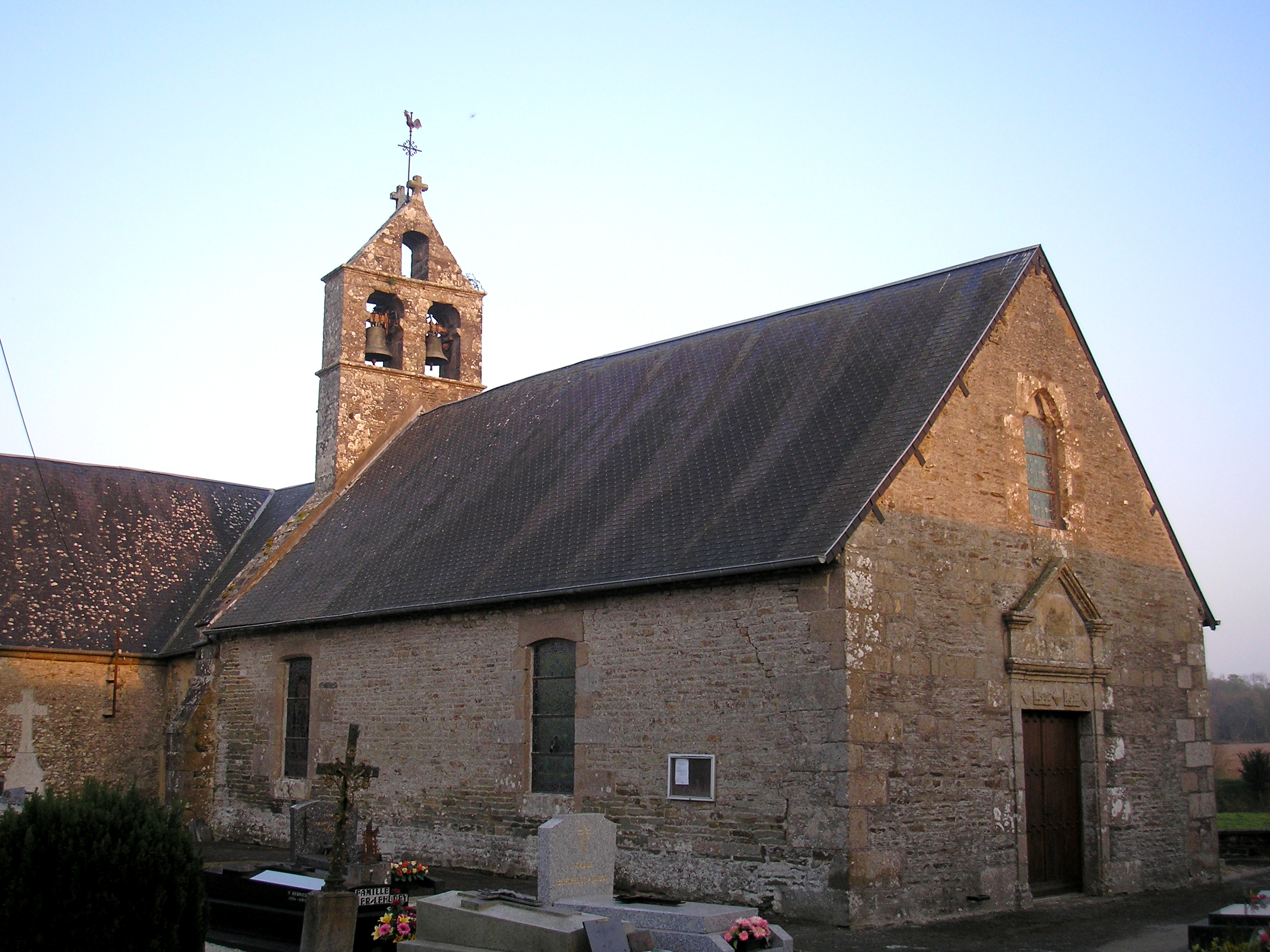 Villiers-le-Pré (Normandie, France). L'église Saint-Pierre.